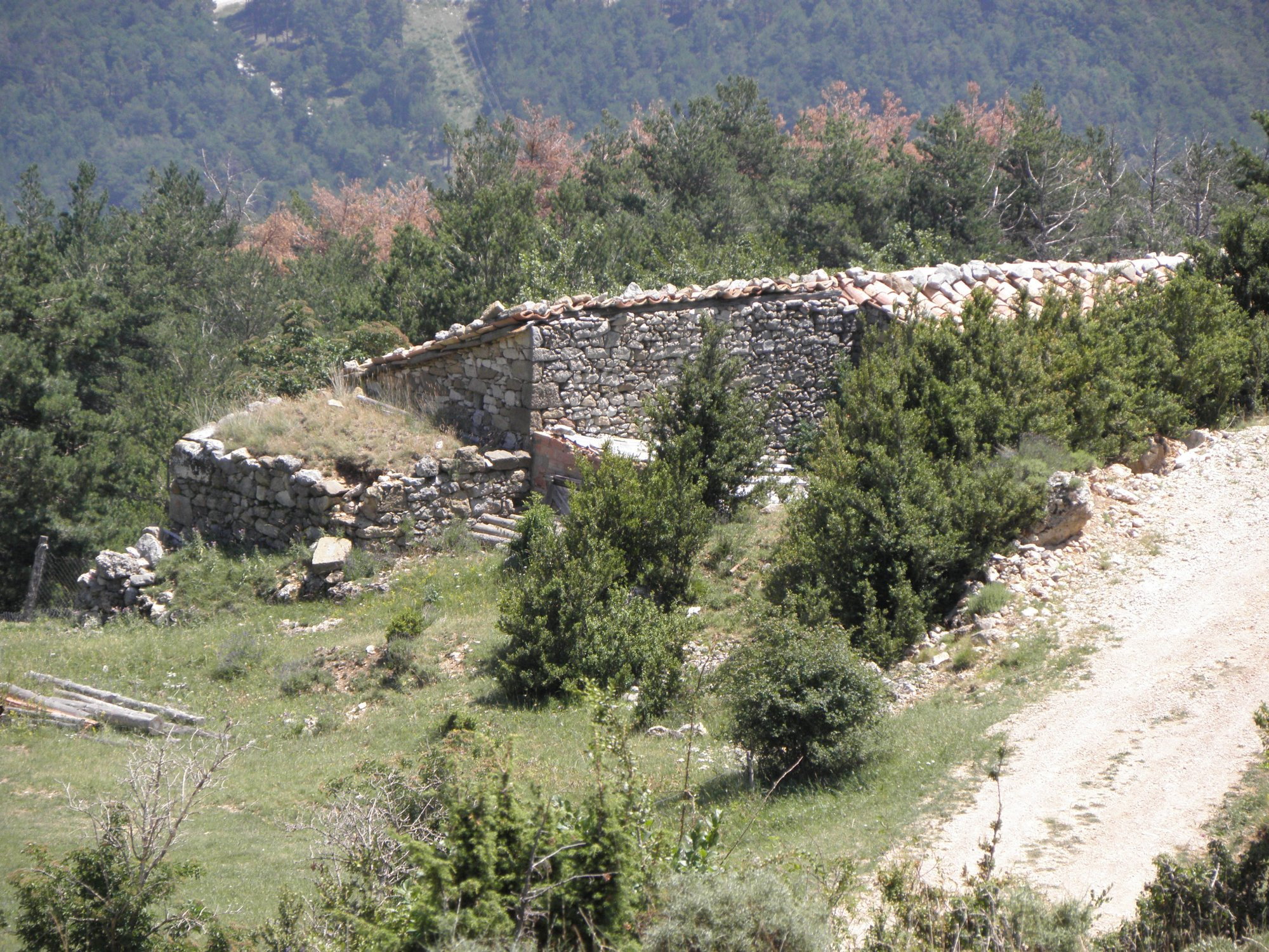 La masia de Cal Culrodó, al poble de la Coma (municipi de la Coma i la Pedra, Vall de Lord, Solsonès) Le façanes posterior de la casa (sud-oest) i nord-oest